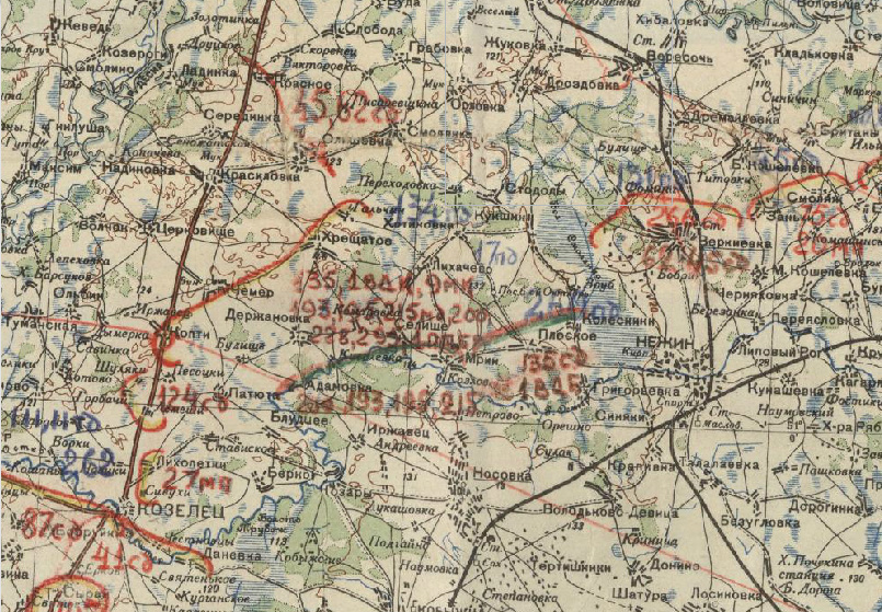 Положение войск Юго-Западного фронта на 12.09.1941 г.